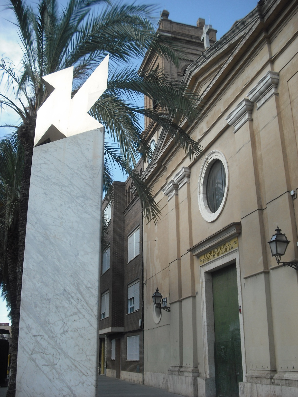 Església de la Verge de Lepant de Castellar.